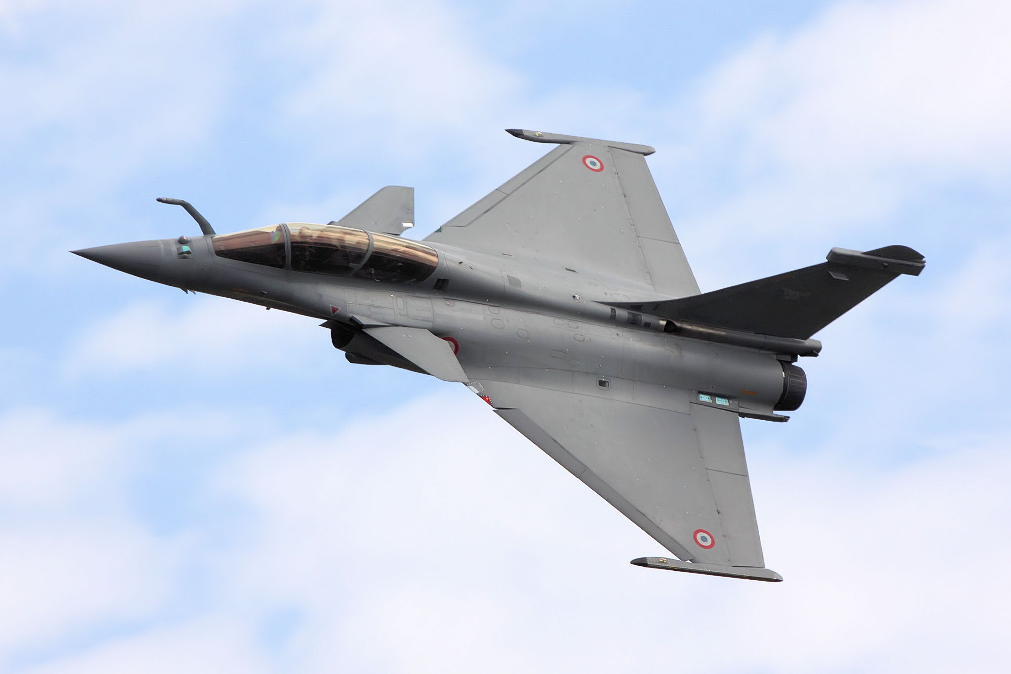 Rafale - RIAT 2009